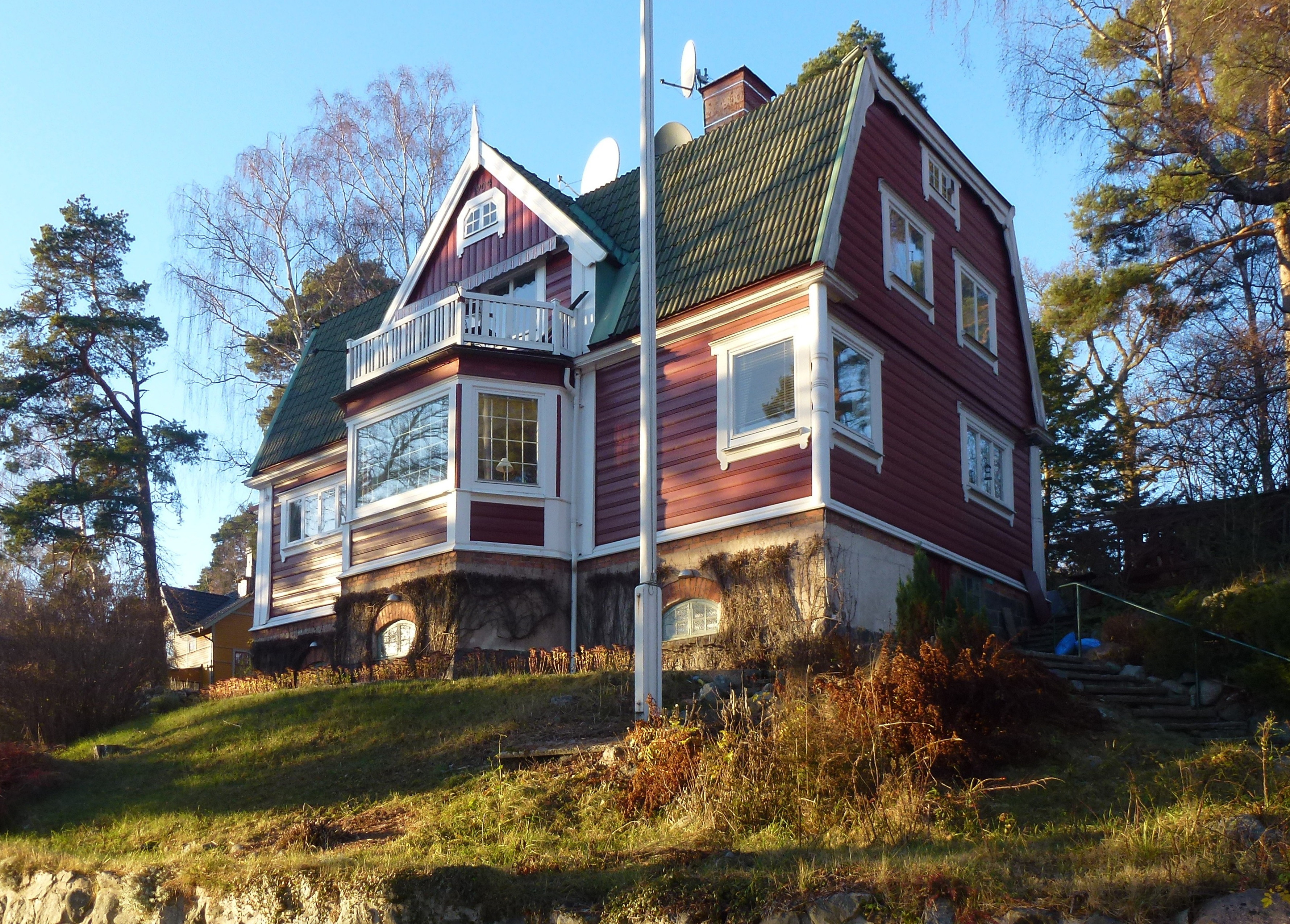 Villa Dahlström, Storängens strandväg 16, arkitekt PG Hjertén